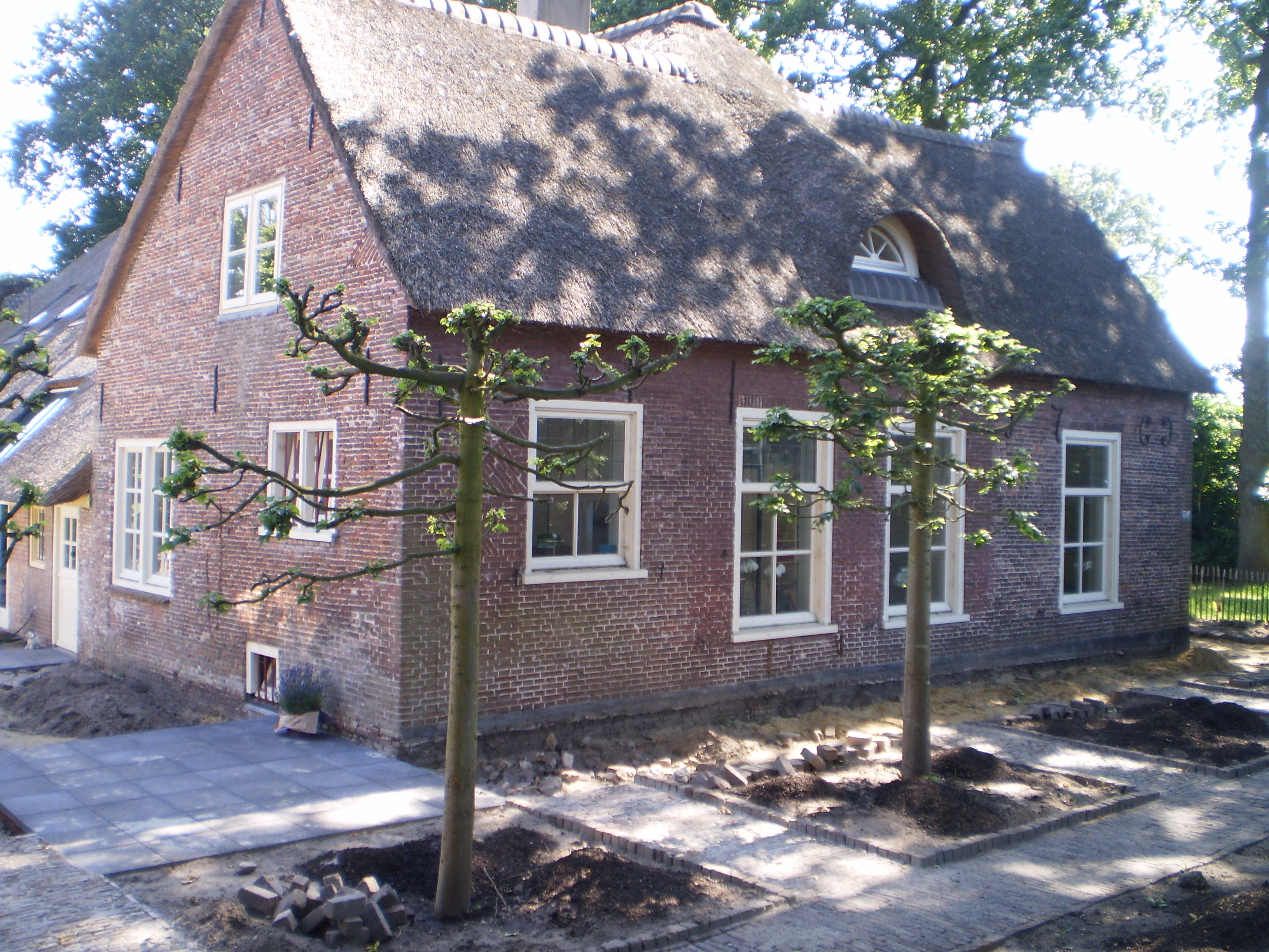 Soest De Swaen 2025 na renovatie